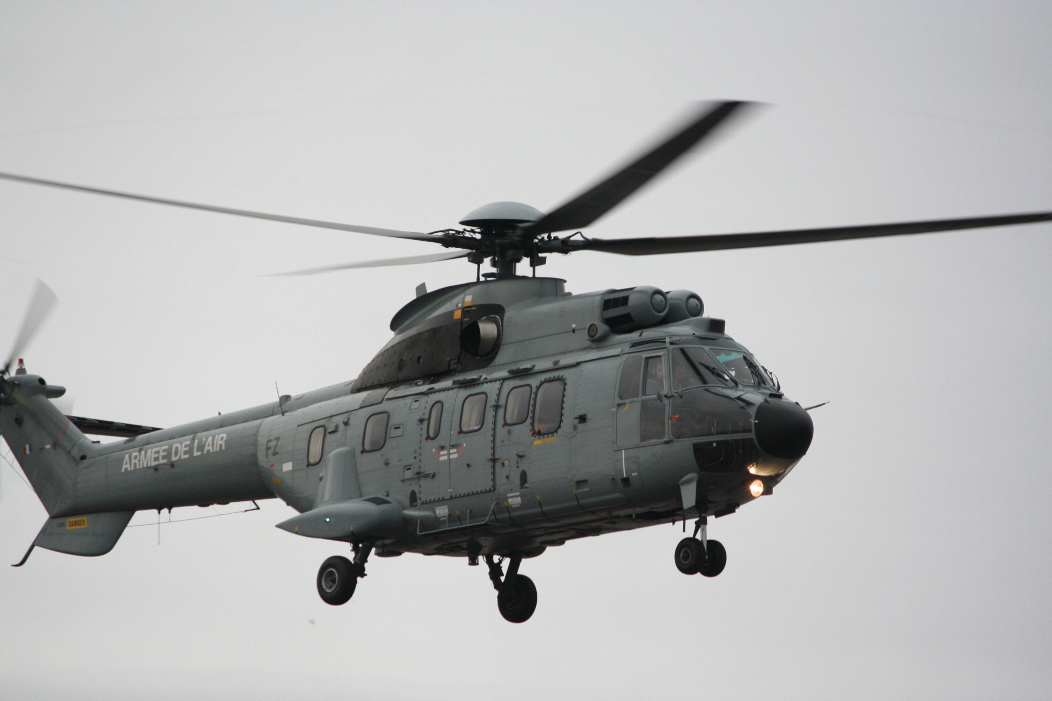 Visite de Nicolas Sarkozy à Saint-Lô en janvier 2009